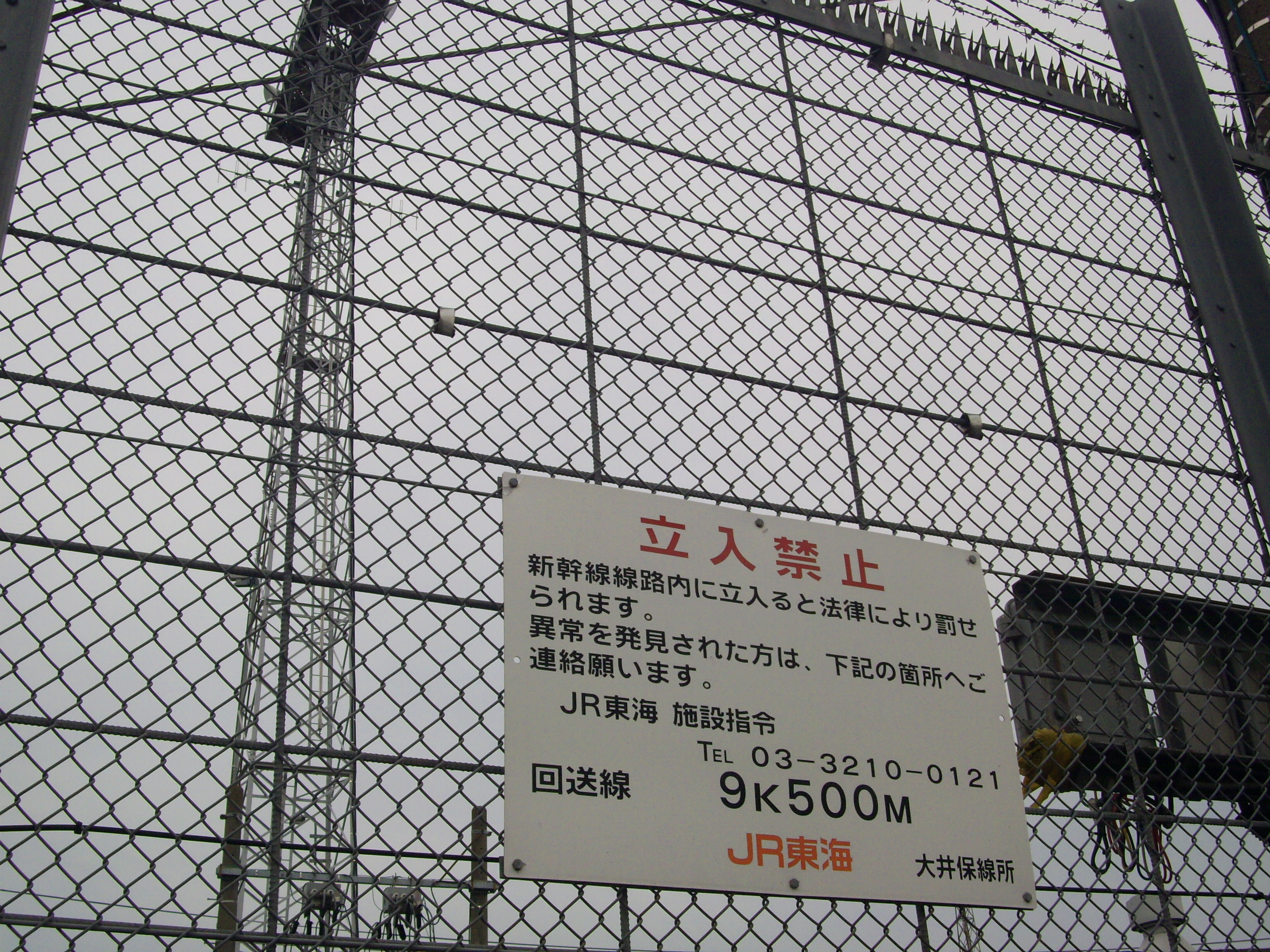 東海道新幹線大井車両基地引き込み線：車両基地に到着、夜間照明の投光塔が建つ ㊟カメラを起動すると日付機能が出荷時のものに初期化されるため、ファイル履歴の撮影日時とメタデータの原画像データの生成日時が異なります